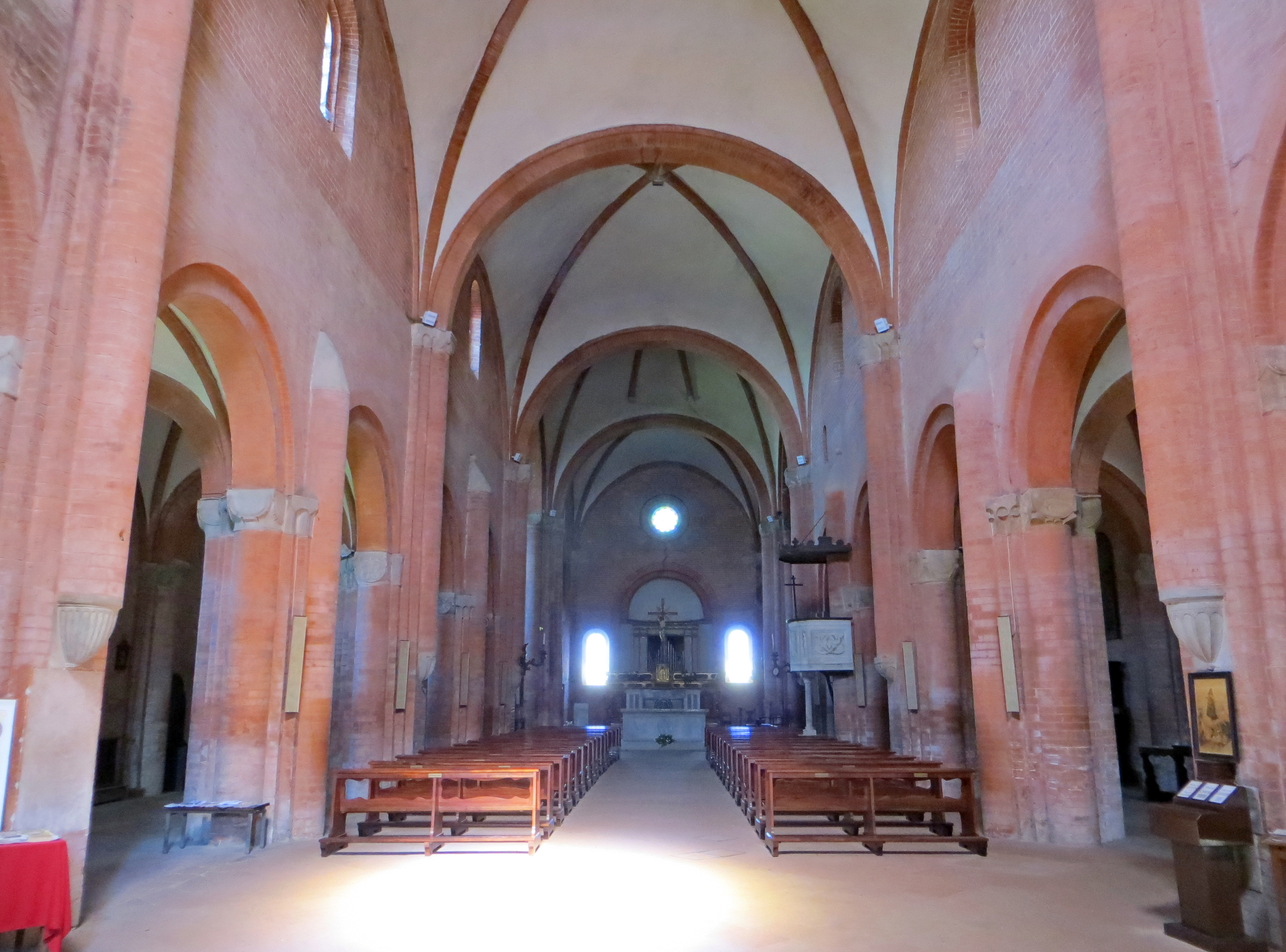 Abbazia di San Bernardo (Fontevivo) - navata centrale della chiesa